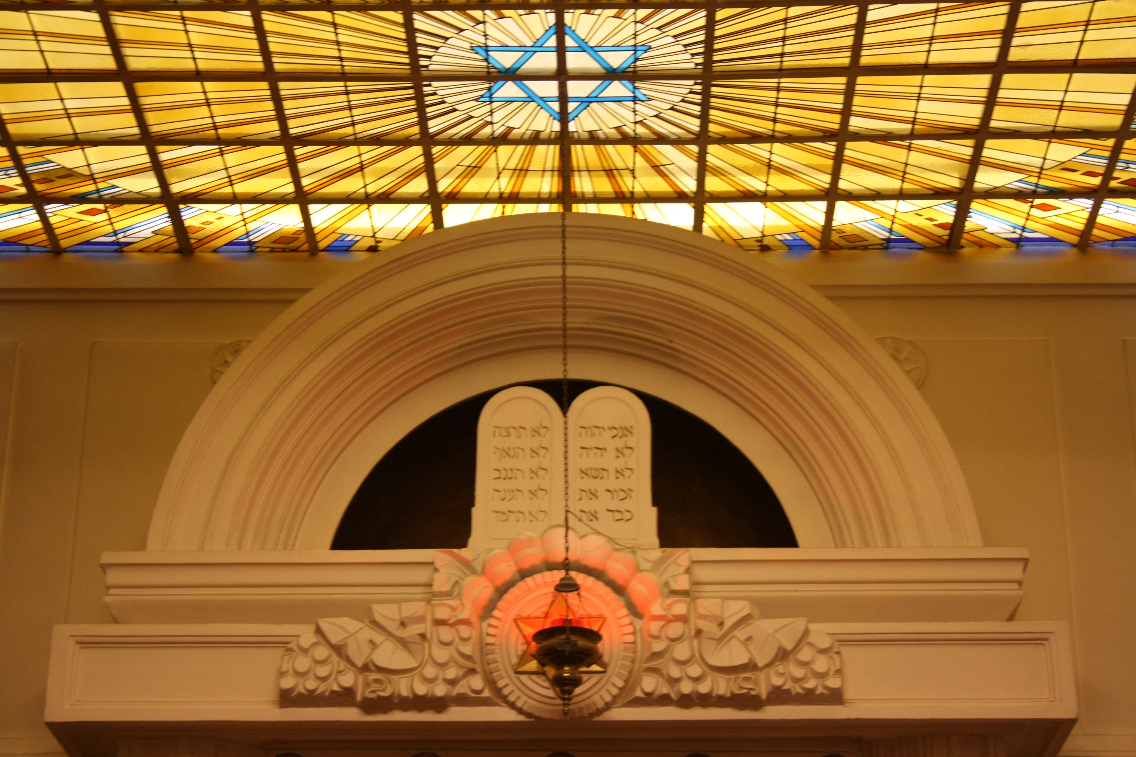 Synagoge der Rue Copernic (auch Synagoge der Union Libérale Israélite de France genannt), 24, rue Copernic, im 16. Arrondissement von Paris, Oberlicht und Gesetzestafeln über dem Toraschrein